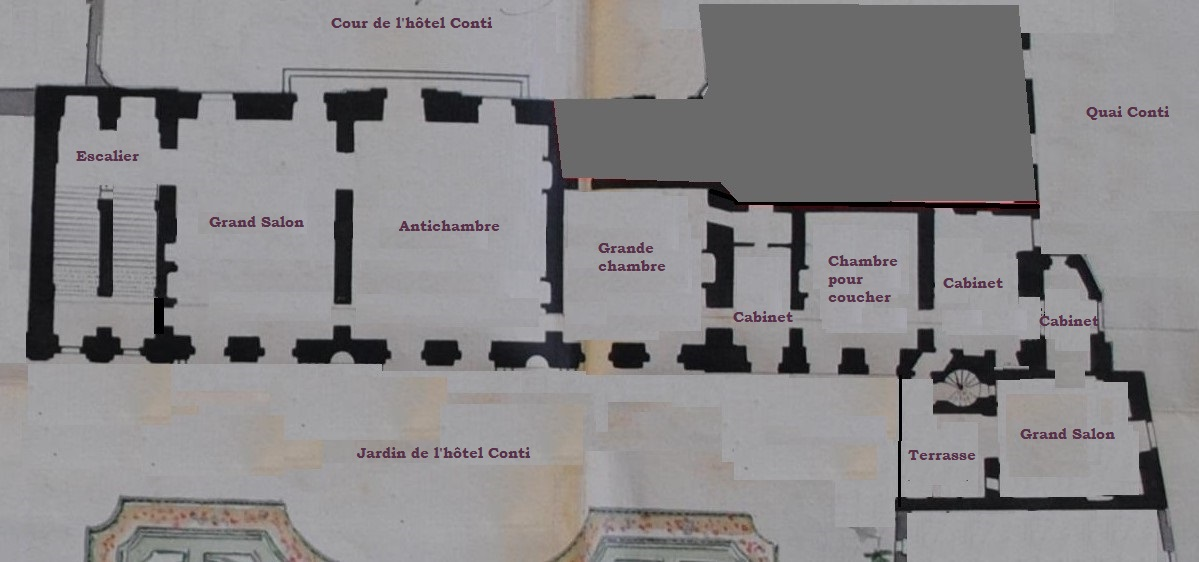 Distribution du premier étage de l'hôtel de Conti, au temps du Grand Conti, vers 1690.